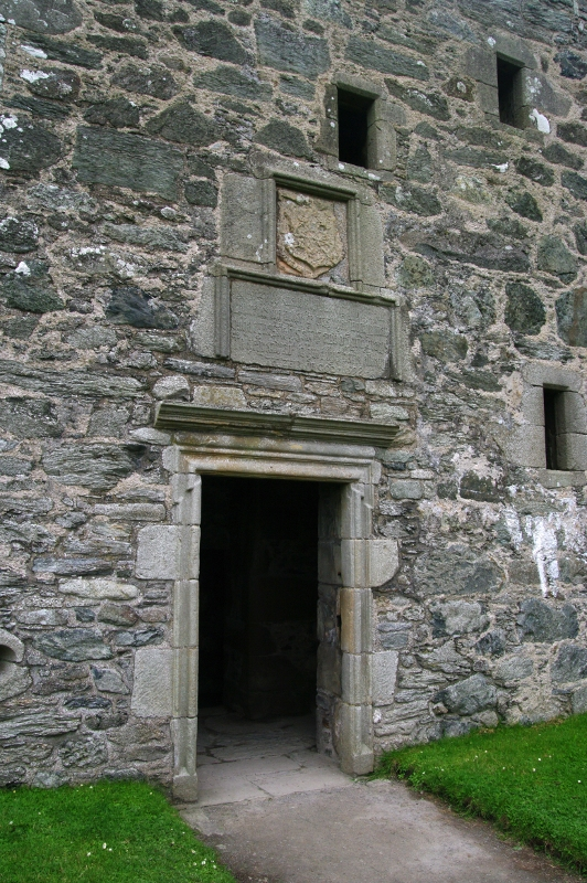 Inscription et porte du Muness Castle, situé aux Shetland, en Écosse